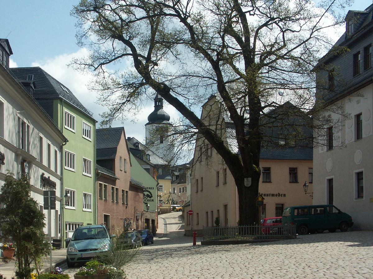 Schwarzenberg/Erzg.: Eiche am Untermarkt